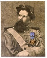 Patriota italiano, medaglia d'oro al valor militare